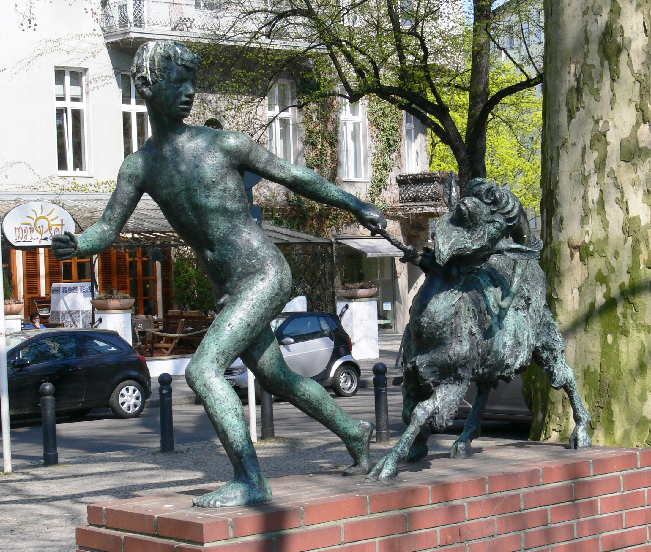 Berlin-Charlottenburg, Savignyplatz, "Knabe mit Ziege" von August Kraus